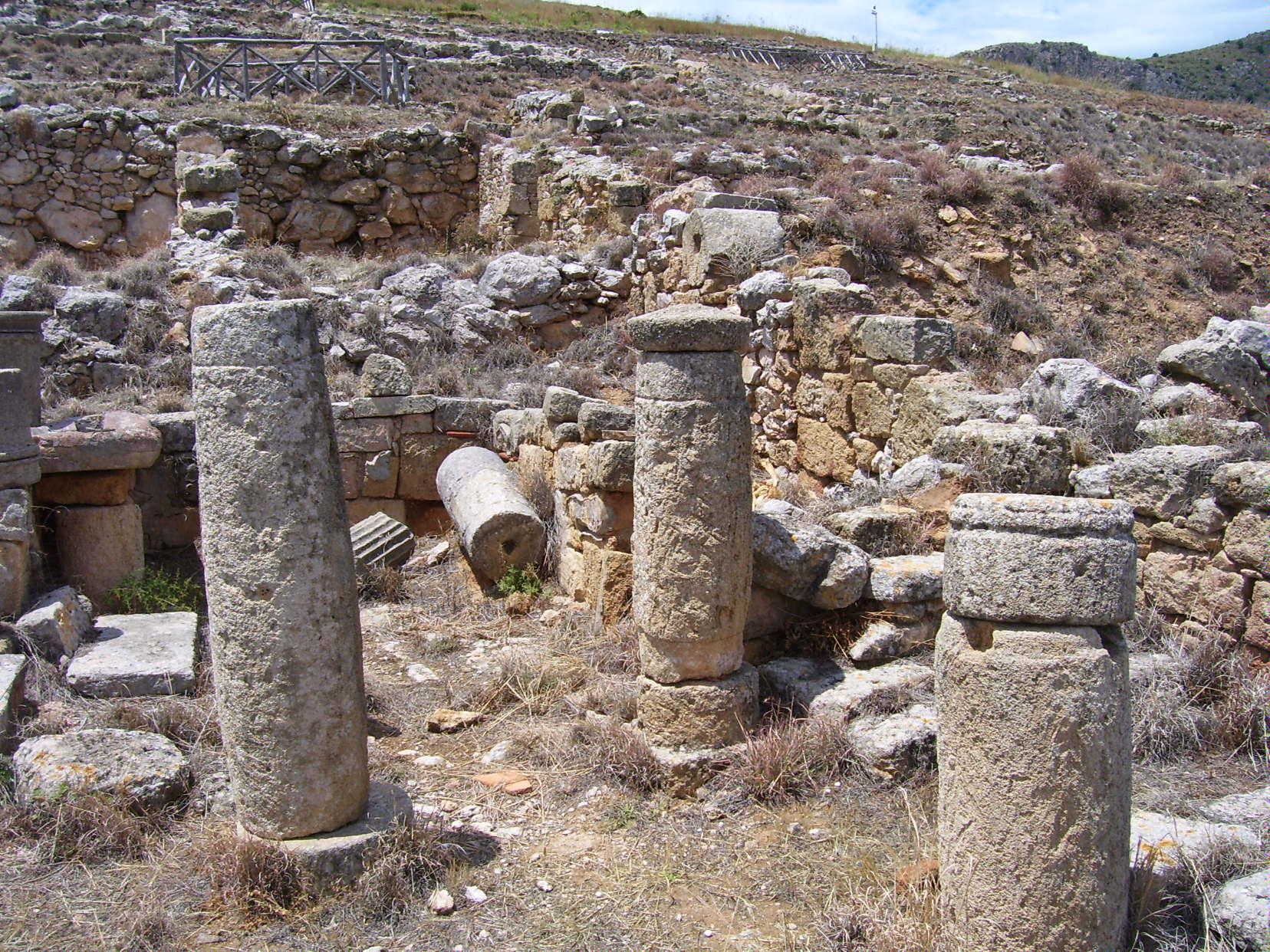 Solunto ruins